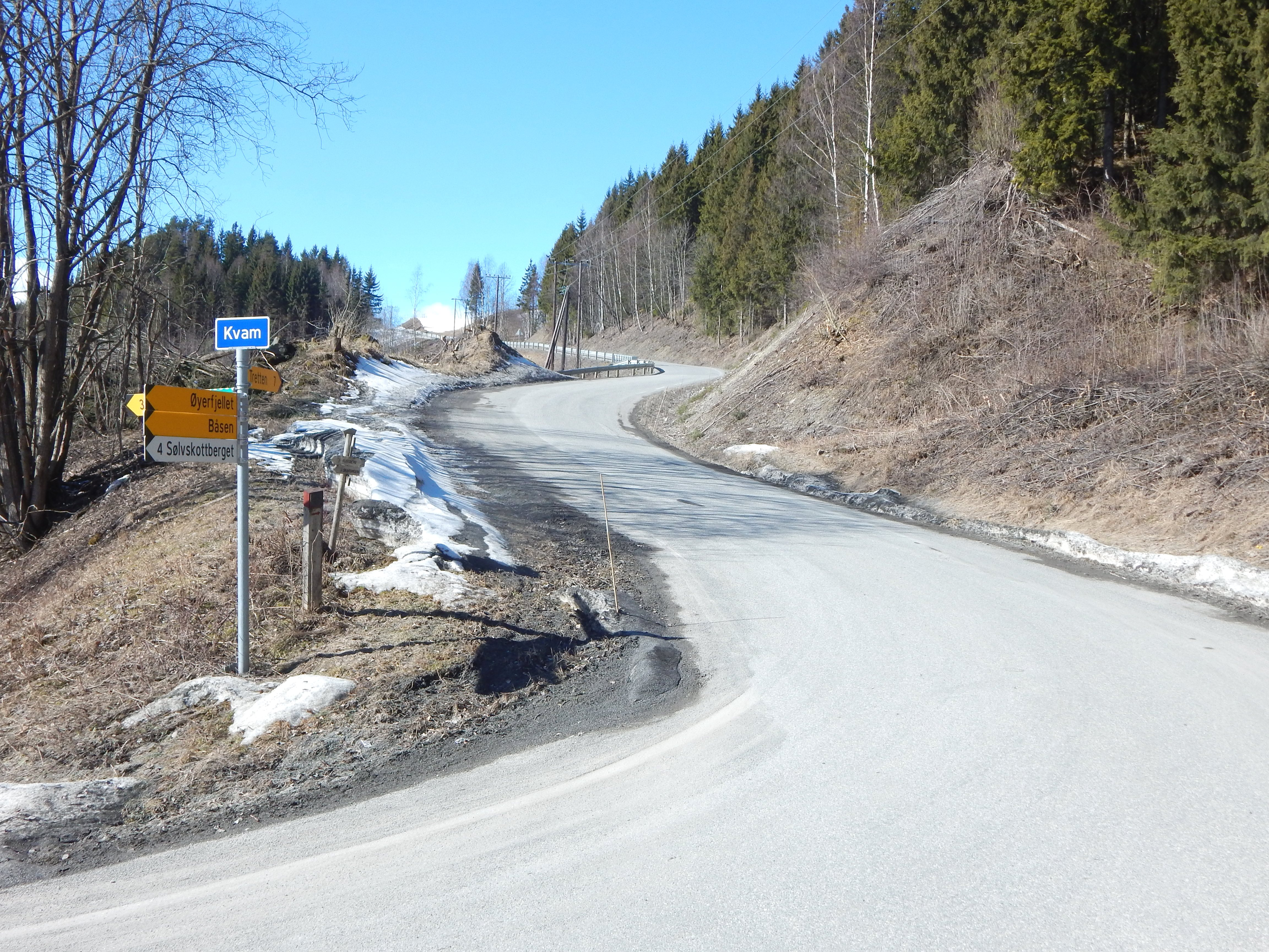 Kananvegen (fylkesvei 359) ved Kvam i Øyer, ved enden mot Nordbygdsvegen (fylkesvei 361)